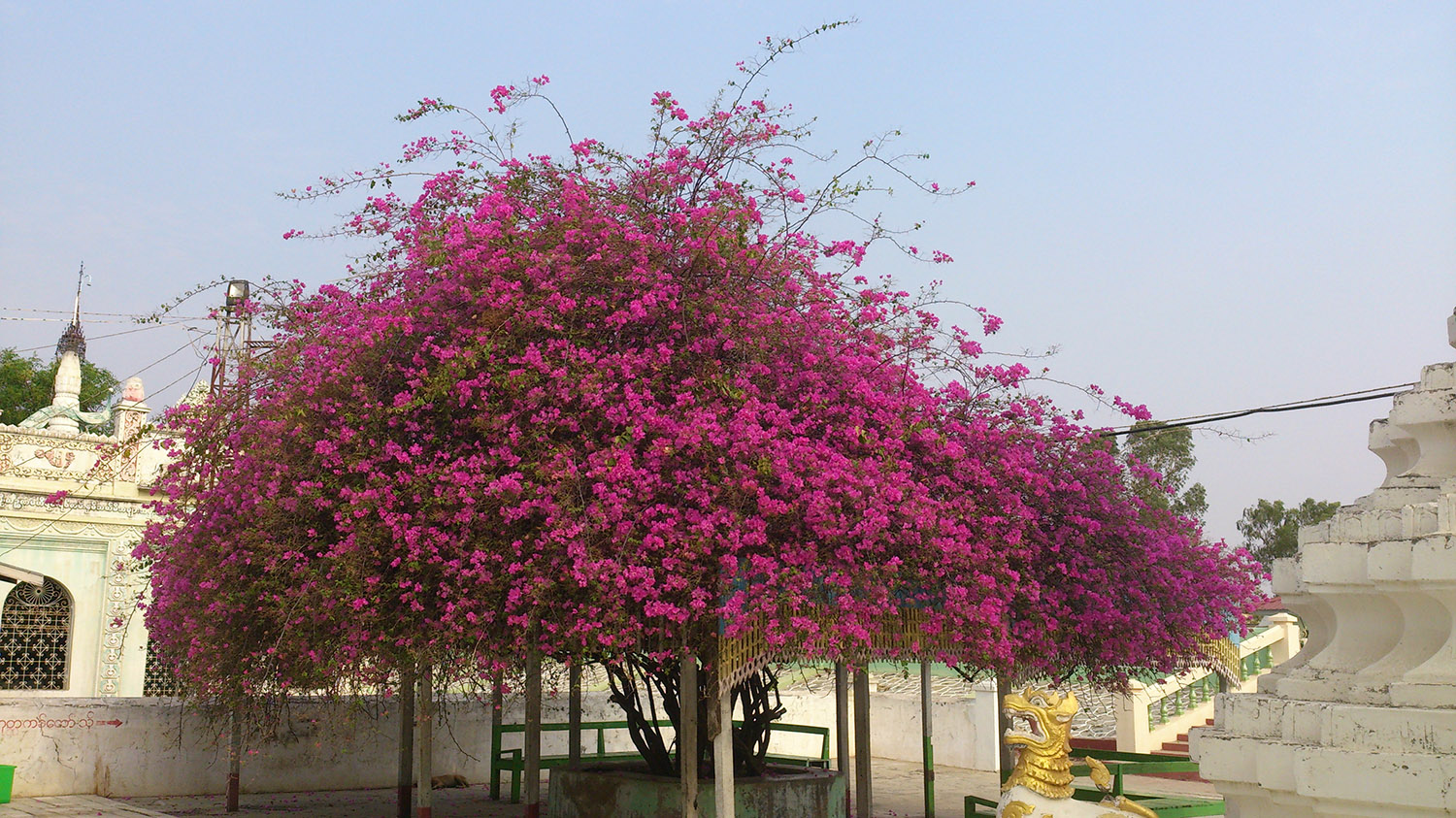 မြန်မာဘာသာ: စက္ကူပန်းပင်ဖြင့် နားနေစရာ အမိုးလုပ်ထားစဉ်